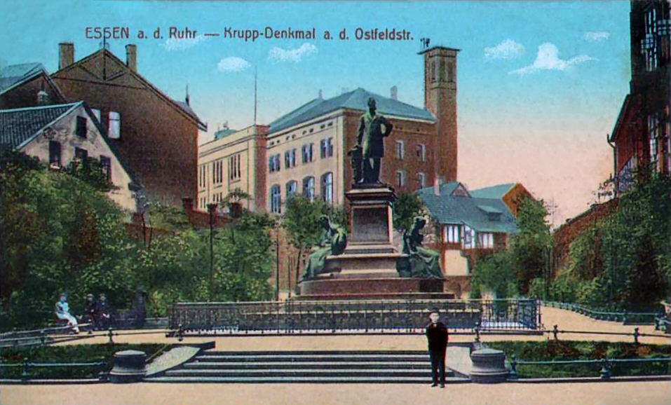 Alfred-Krupp-Denkmal in Essen, mit der Kruppschen Konsumanstalt im Hintergrund